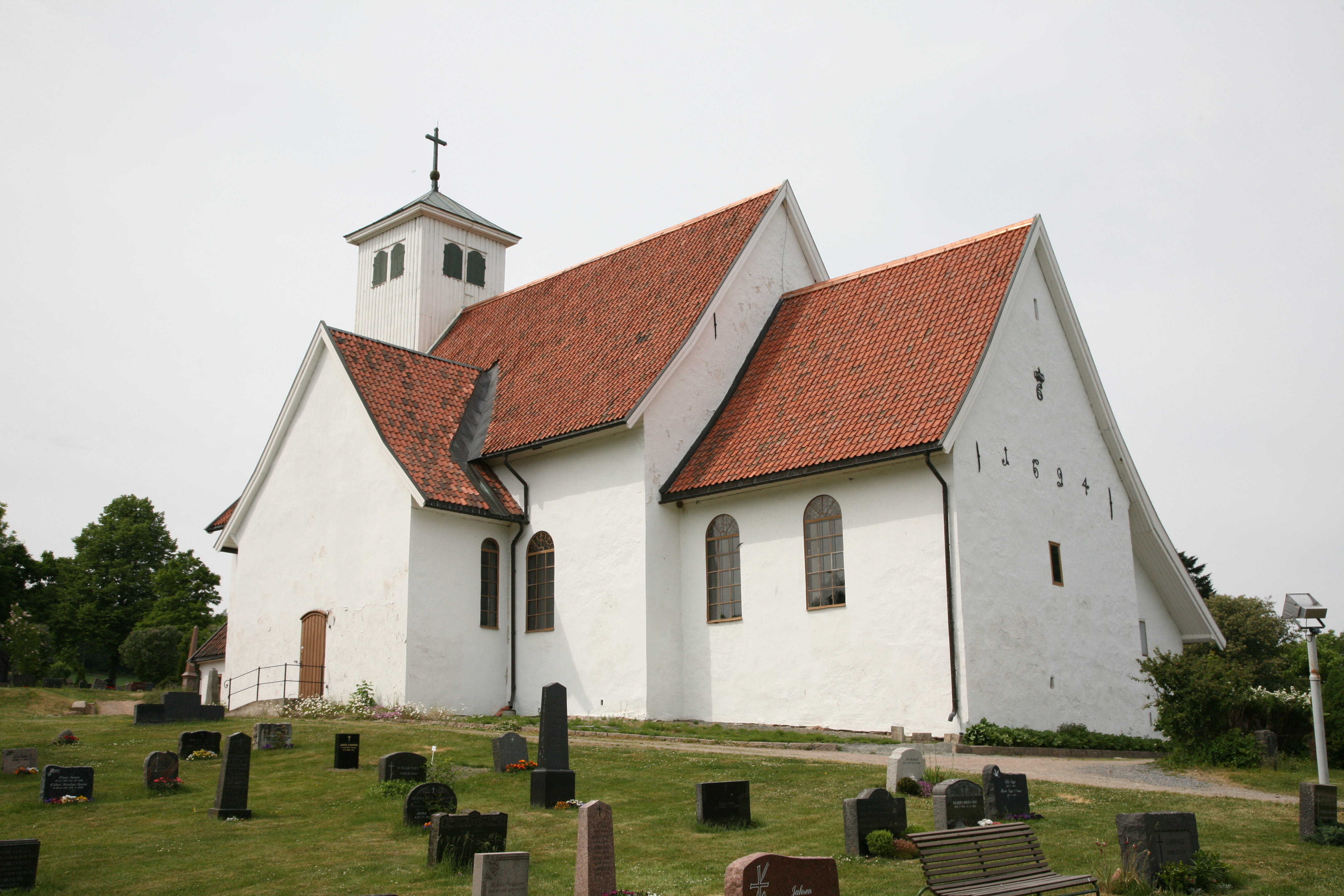 Frogner church in Lier, Buskerud, Norway